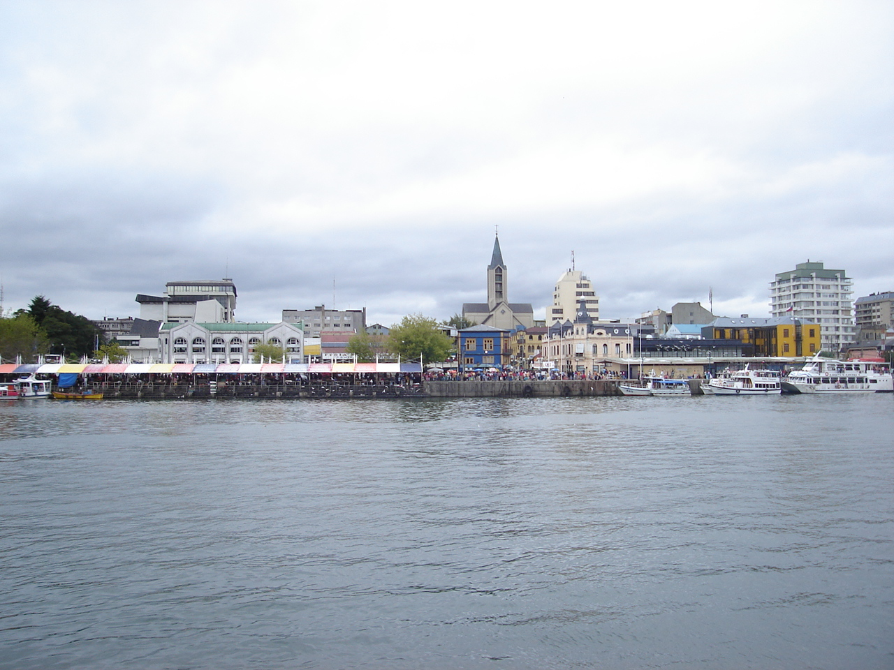 Valdivia vista desde la isla de Teja